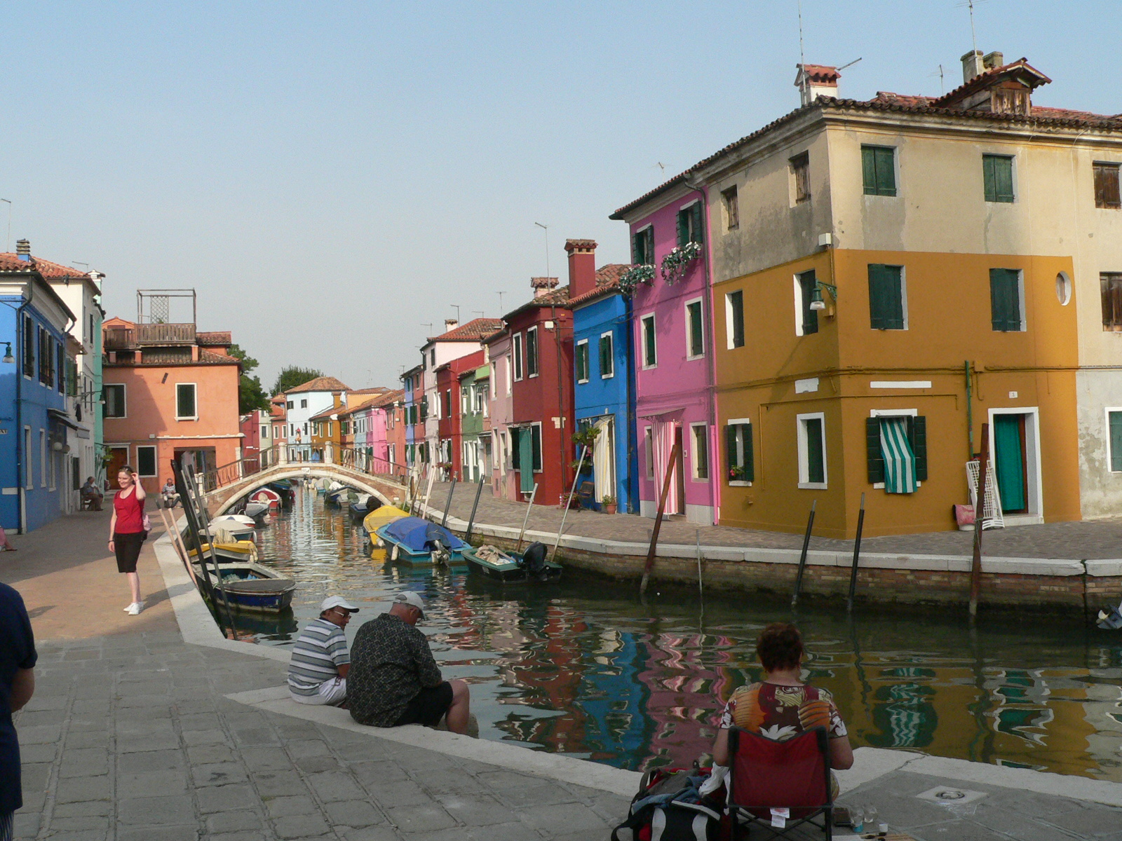 Burano, Rio Terranova